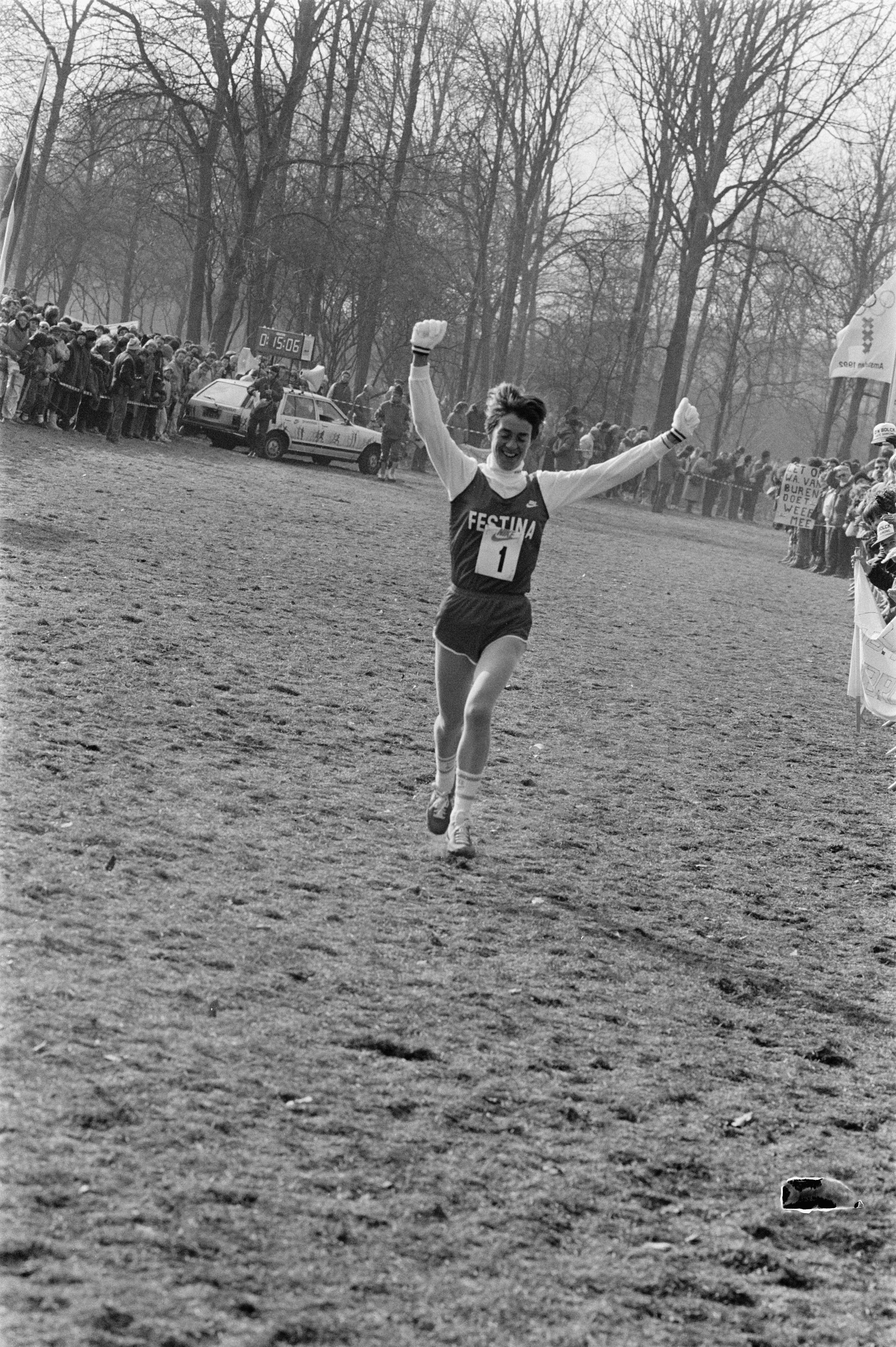 Collectie / Archief : Fotocollectie Anefo Reportage / Serie : Nederlandse Veldloopkampioenschappen in Amsterdamse bos Beschrijving : Carla Beurskens gaat bij de dames als eerste over de finish Datum : 2 maart 1986 Locatie : Amsterdam, Noord-Holland Trefwoorden : veldlopen Persoonsnaam : Beurskens, Carla Fotograaf : Bogaerts, Rob / Anefo, [onbekend] Auteursrechthebbende : Nationaal Archief Materiaalsoort : Negatief (zwart/wit) Nummer archiefinventaris : bekijk toegang 2.24.01.05 Bestanddeelnummer : 933-5815